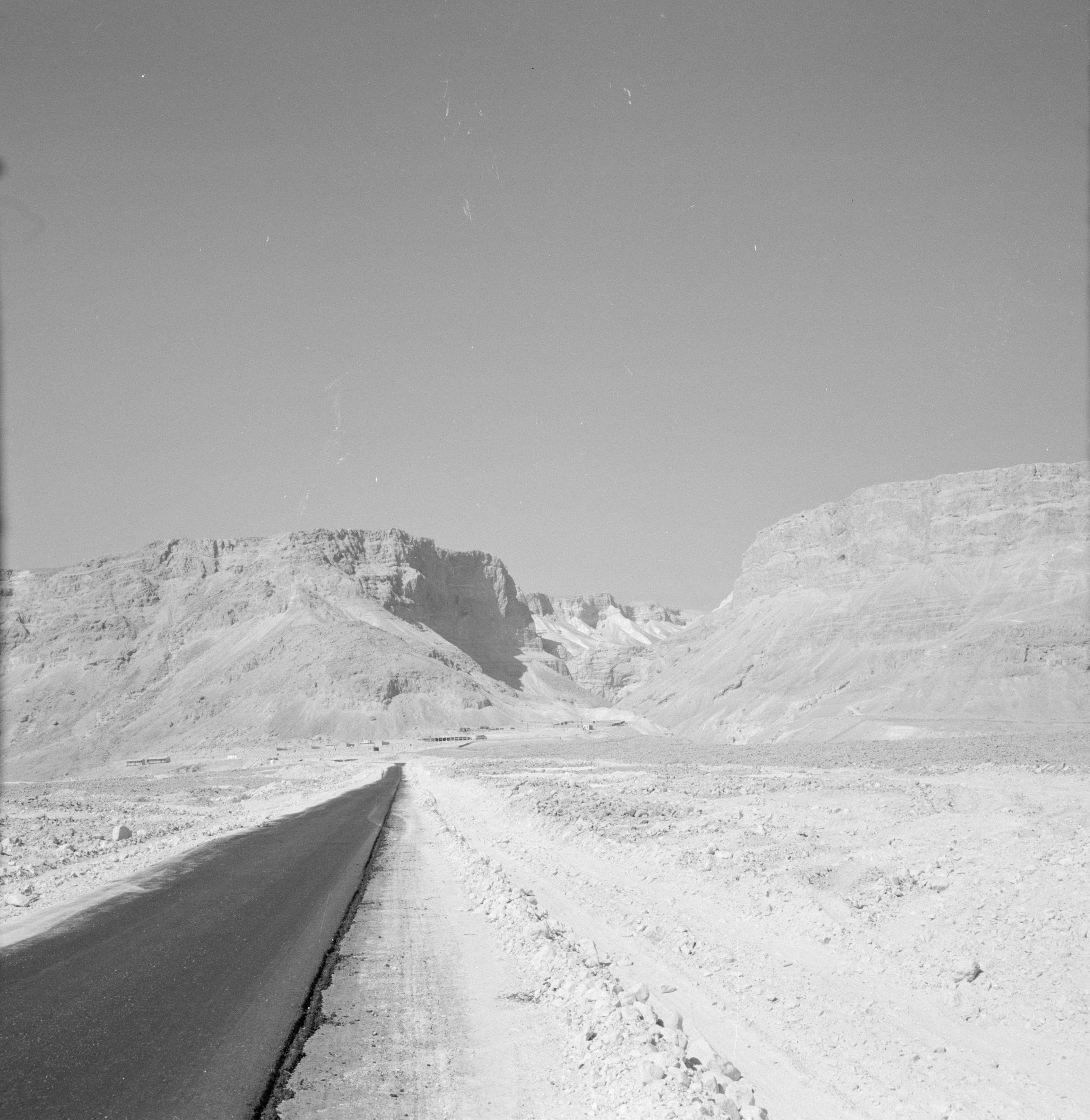 Collectie / Archief : Fotocollectie Van de Poll Reportage / Serie : Israël 1964-1965: Dode Zeegebied Beschrijving : Een weg naar Massada. Annotatie : Massada is een citadel op een rots bij de Dode Zee. Het is bekend door het verzet van gevluchte joden tegen de Romeinse bezetting na 70 n.C. Datum : 1964 Locatie : Israël, Massada Trefwoorden : bergen Fotograaf : Poll, Willem van de, [onbekend] Auteursrechthebbende : Nationaal Archief Materiaalsoort : Negatief (zwart/wit) Nummer archiefinventaris : bekijk toegang 2.24.14.02 Bestanddeelnummer : 255-2720